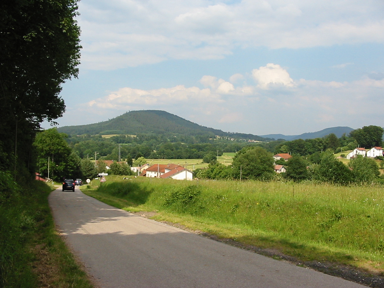 La commune de Beauménil, dans le département des Vosges, depuis la rue de l'Ermite.